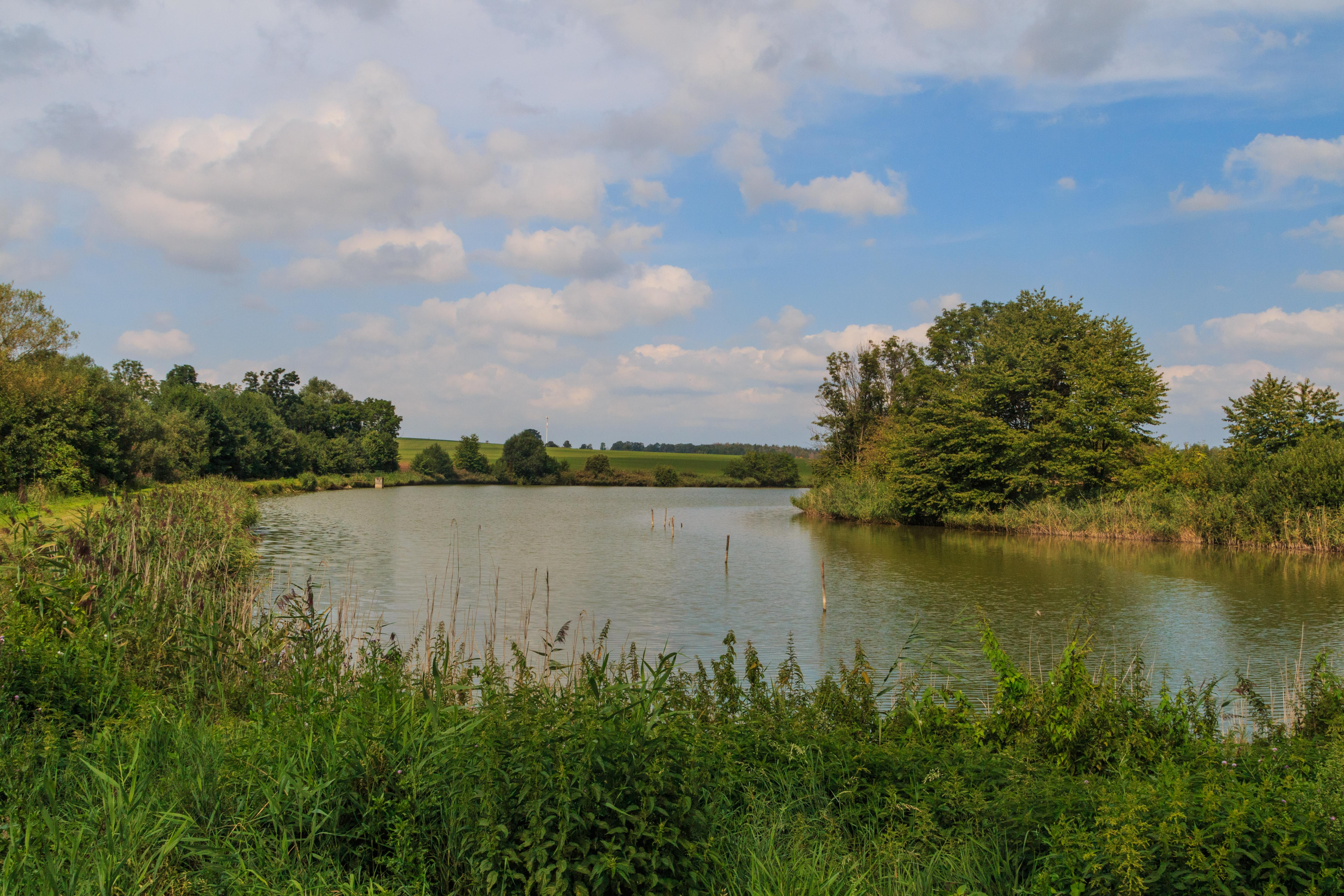 Prostřední Heřmanický rybník